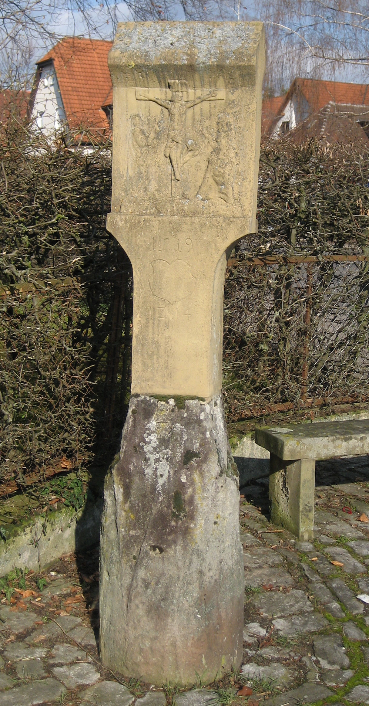 Öhringen Rendelstein, Gotischer Bildstock auf einem römischen Säulenschaft (Jahresangaben 1519 und 1714), Standort: Kreuzung Haller Straße/Rendelstraße